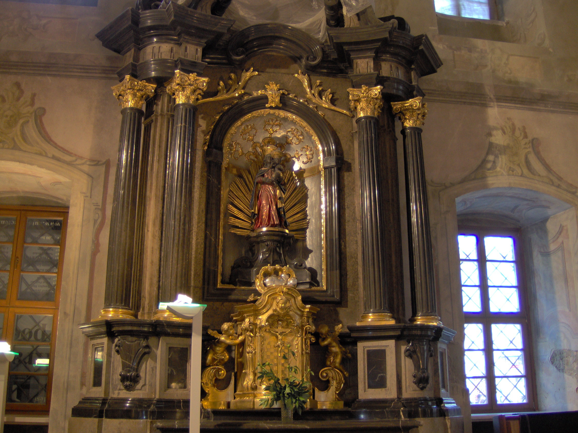 Oltář v kapli v Paláci Šlechtičen v Brně